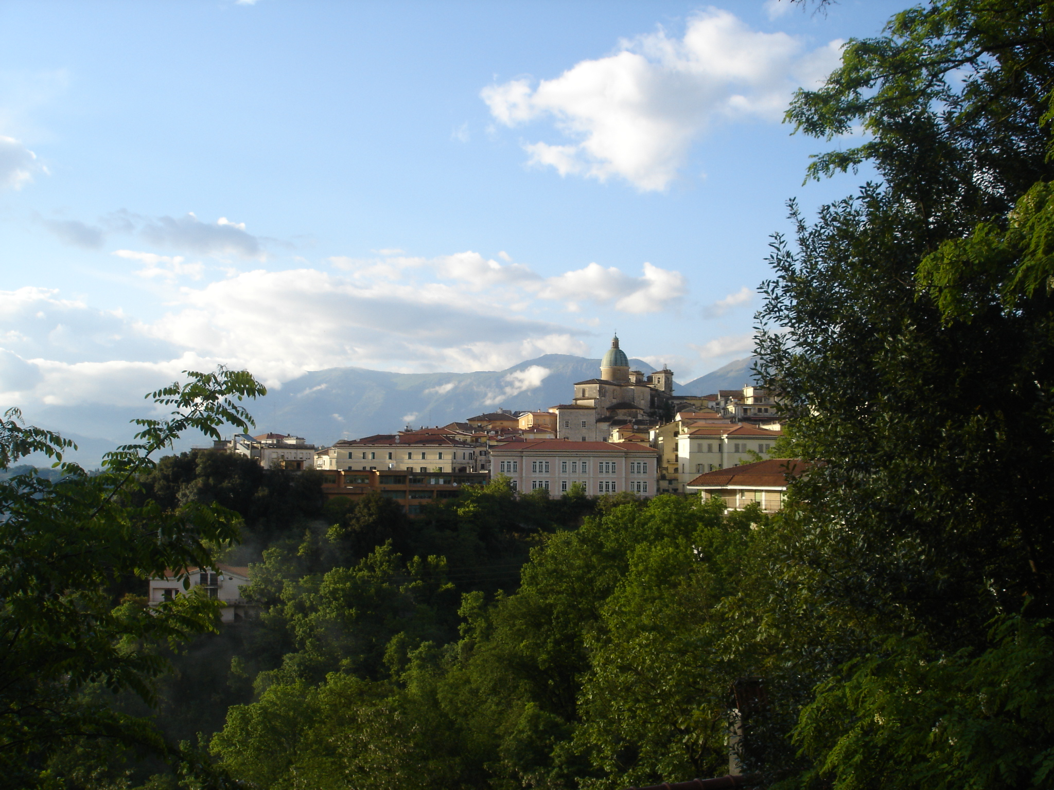 Атина, Италия.